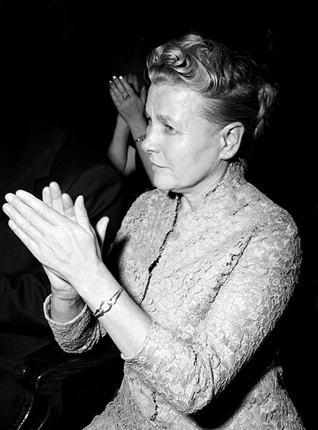 Yekaterina Furtseva